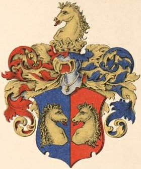 Bodisco suguvõsa aadlivapp